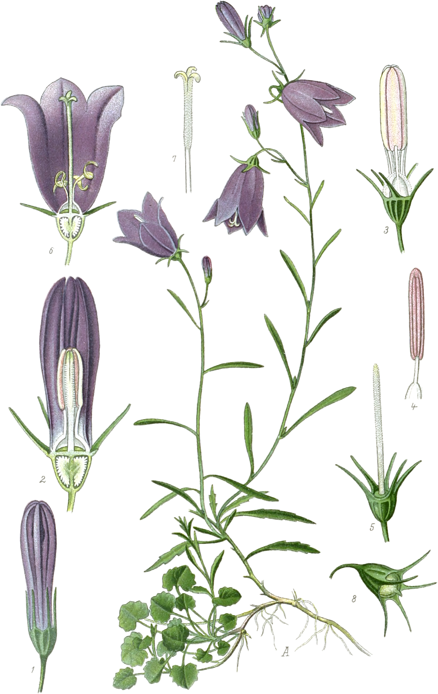 Tafel 561. Campanula rotundifolia L. A blühende Pflanze. 1 Blütenknospe; 2 Längsschnitt durch die Blüte im erstmännlichen Zustande (der Blütenstaub wird in die Griffelbürste entleert und durch sie herausgekehrt); 3 Blüte im männlichen Zustande nach Entfernung der Blumenkrone; 4 Staubblatt von der Innenseite; 5 Griffel aus einer Blüte im männlichen Zustande; 6 Blüte im weiblichen Zustande; 7 Griffel mit reifer Narbe; 8 Kapsel. 1 bis 8 vergrössert.